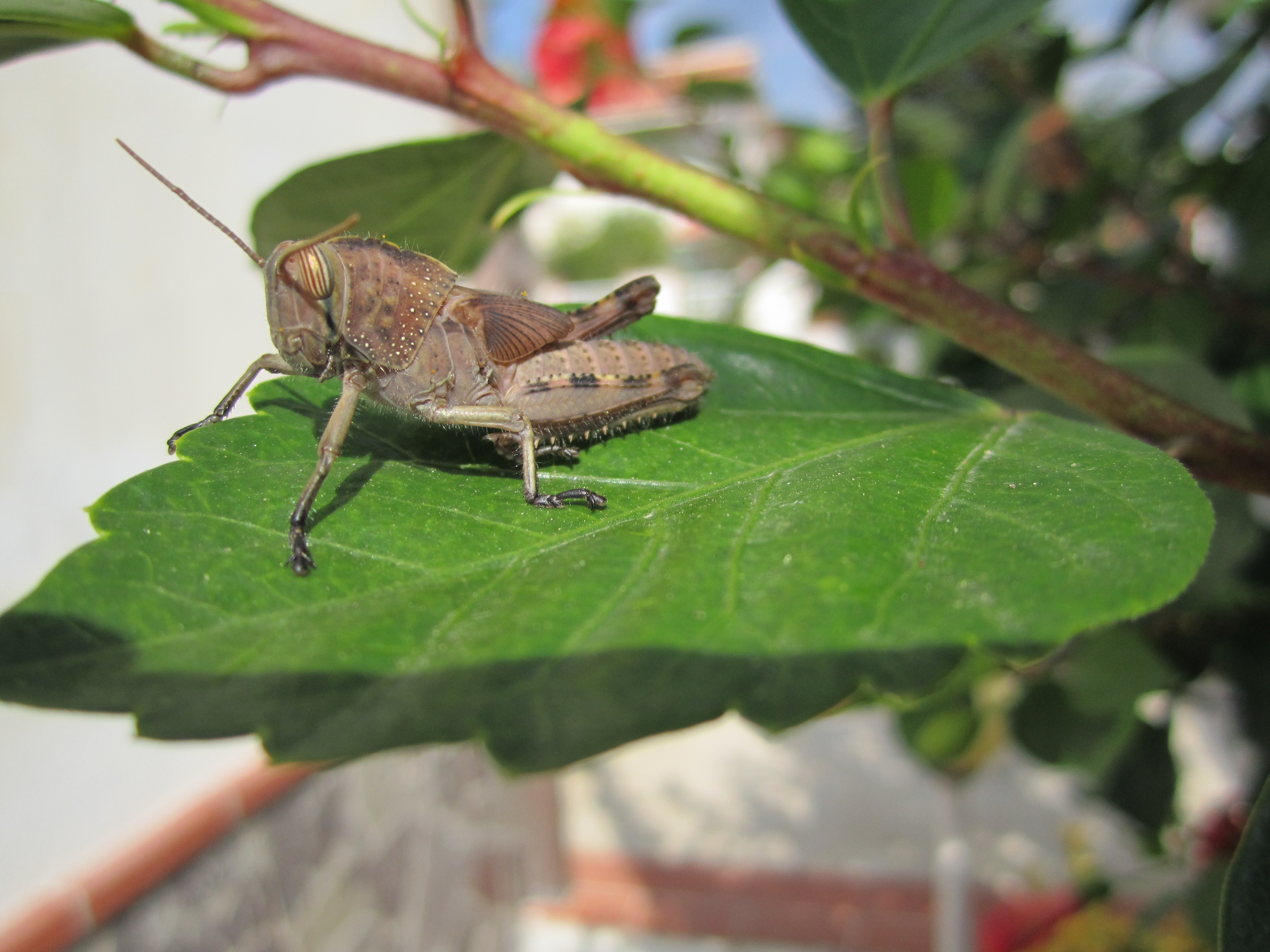 Giovane esemplare di Calliptamus italicus (cavalletta italiana).